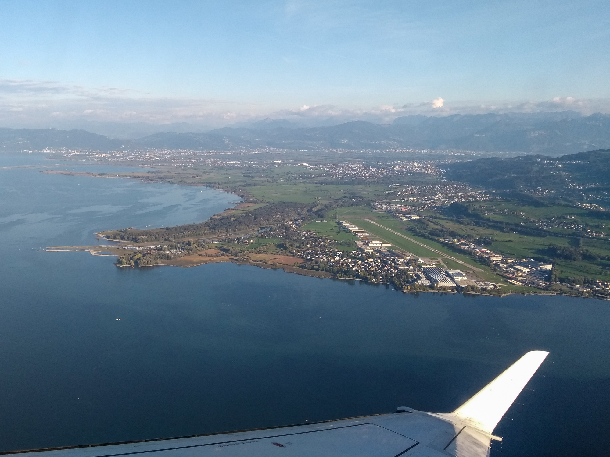 Altenrhein, Flughafen